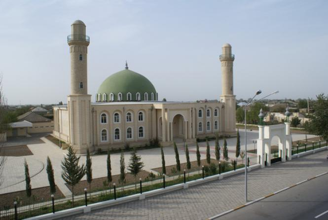 Sabirabad.Heyder mescidi